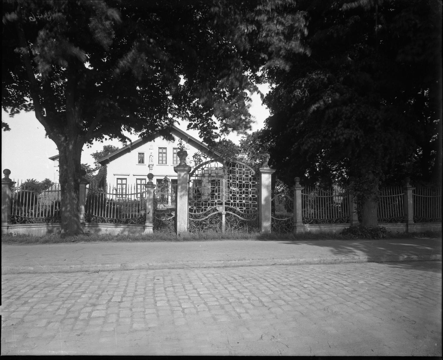 Gut Wolfskuhle an der Kattenturmer Heerstraße in Bremen. Im Vordergrund das sog. Franzosentor aus dem 18. Jahrhundert. Das Gebäude ist nicht erhalten, das Tor im Bremer Focke-Museum. Foto vermutlich von Louis Koch, 1896